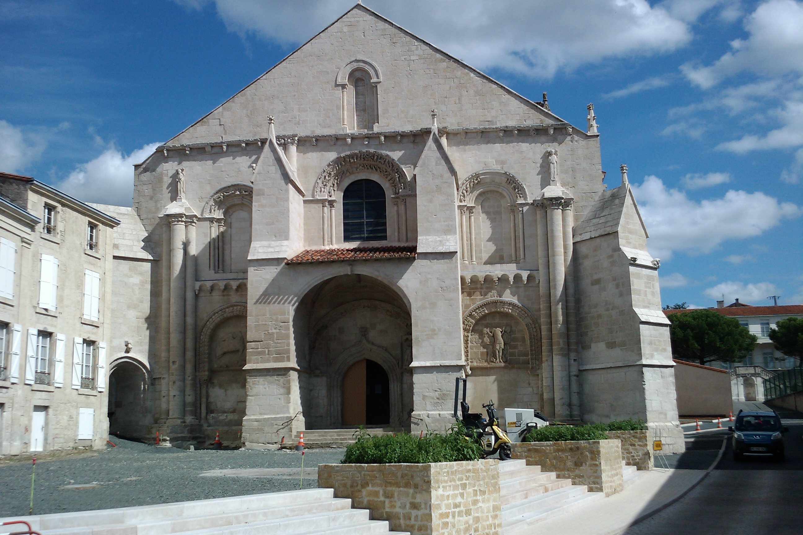 Église Sainte-Eulalie de Benet